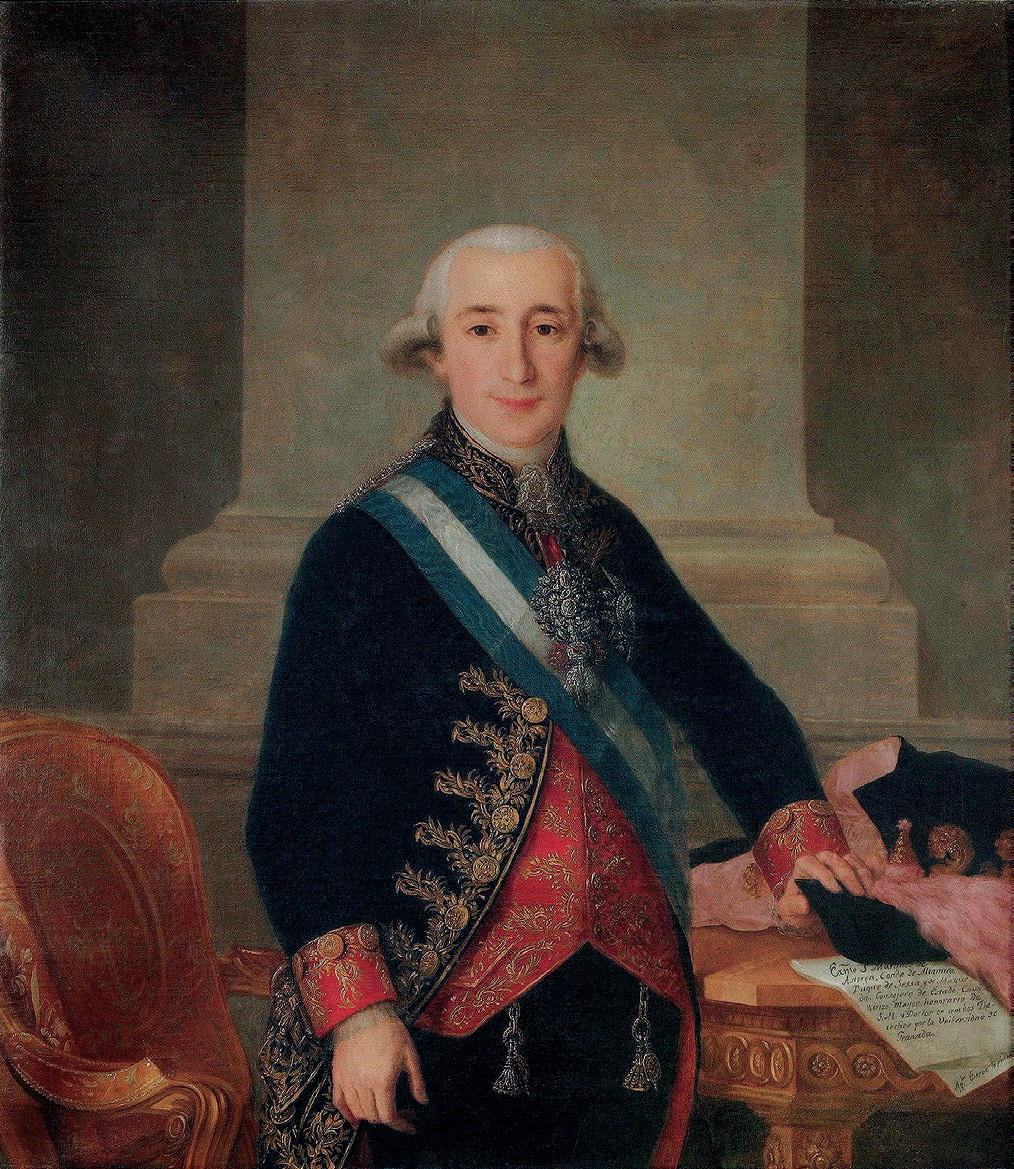 Retrato del aristócrata español Vicente Joaquín Osorio de Moscoso y Guzmán (1756-1816), conde de Altamira y duque de Maqueda.